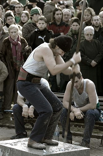 Barrenadoreak